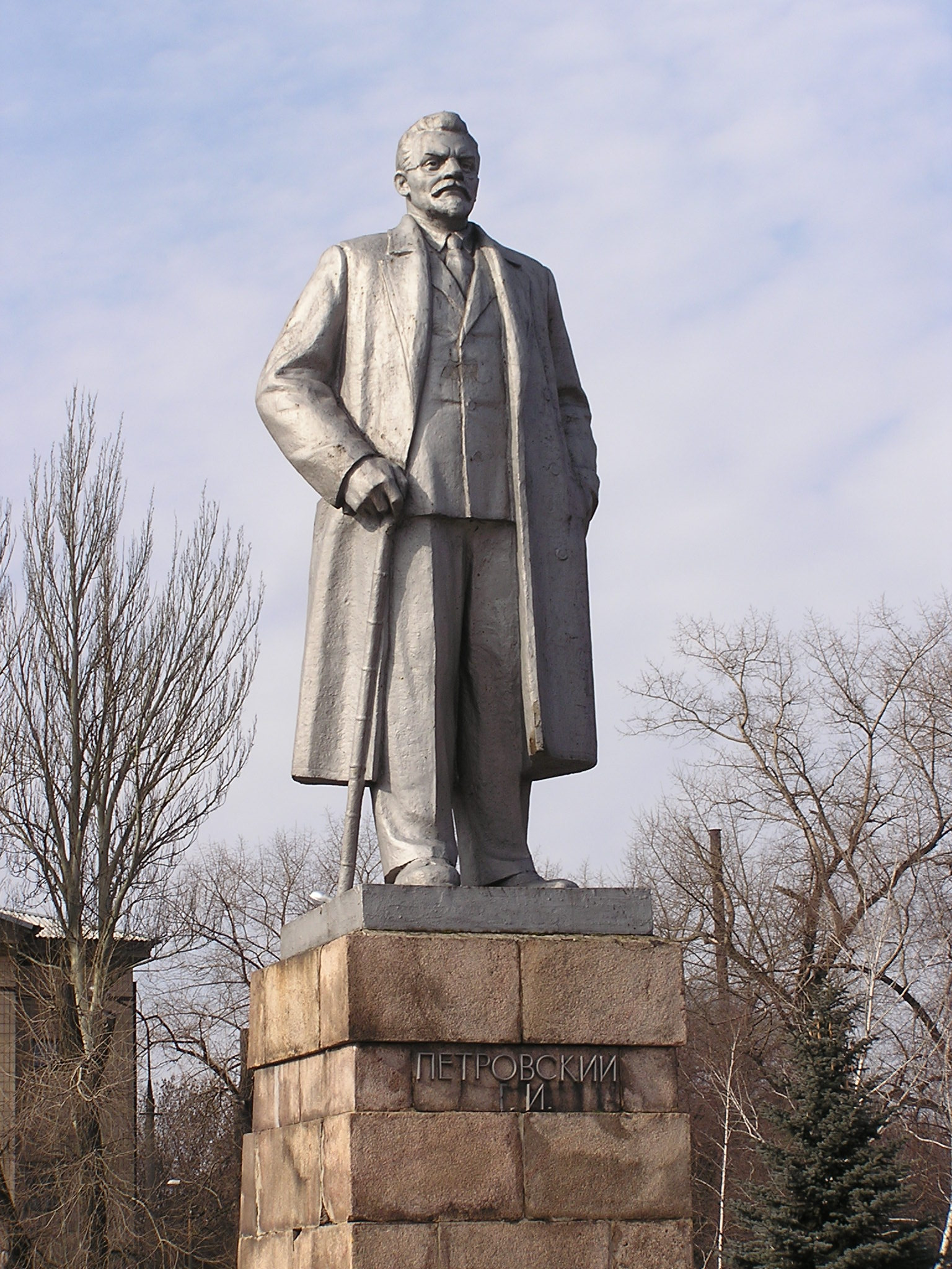 Памятник Григорию Петровскому в Донецке